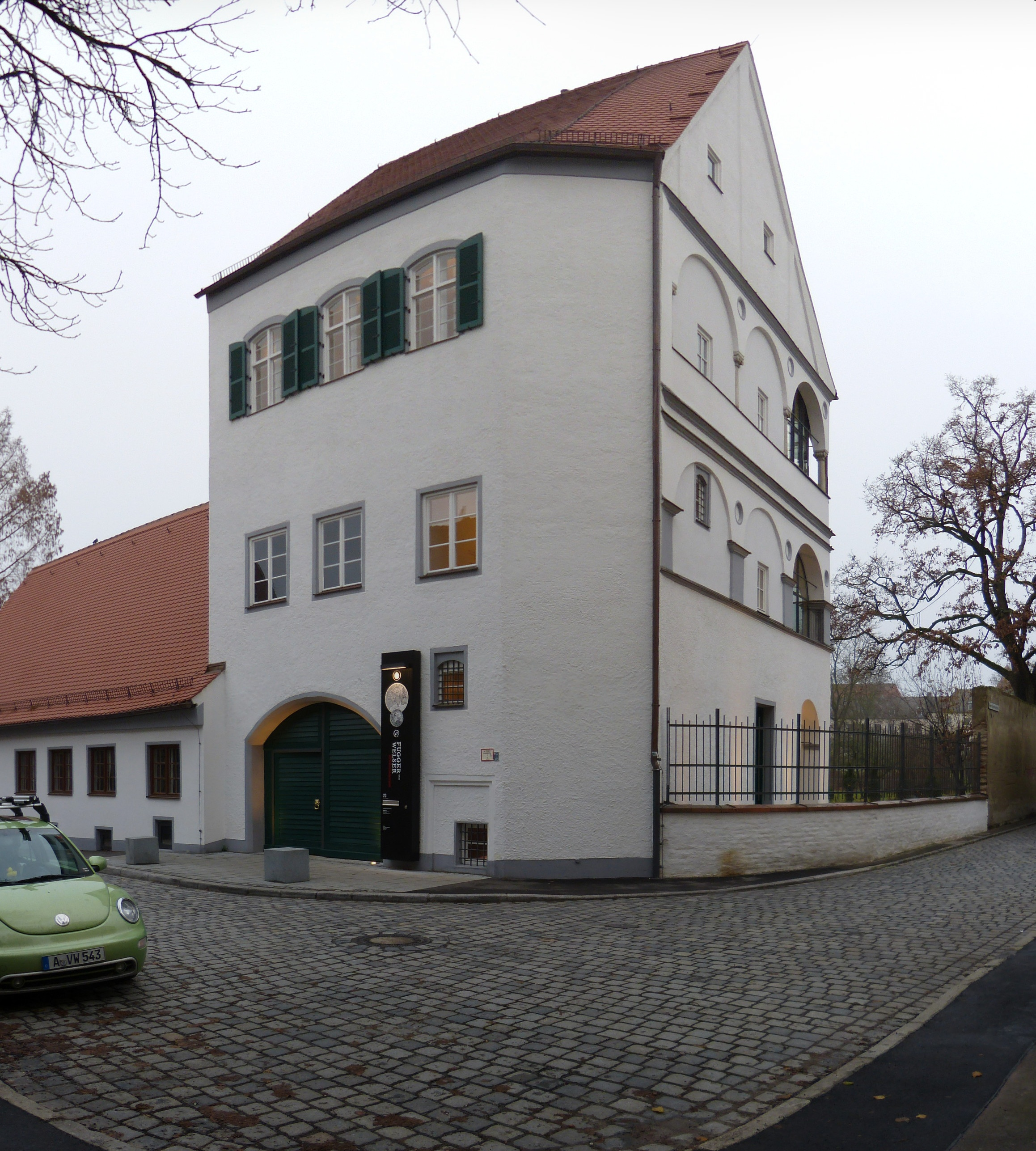 Fugger-und-Welser-Erlebnismuseum, Straßenseite This is a photograph of an architectural monument.